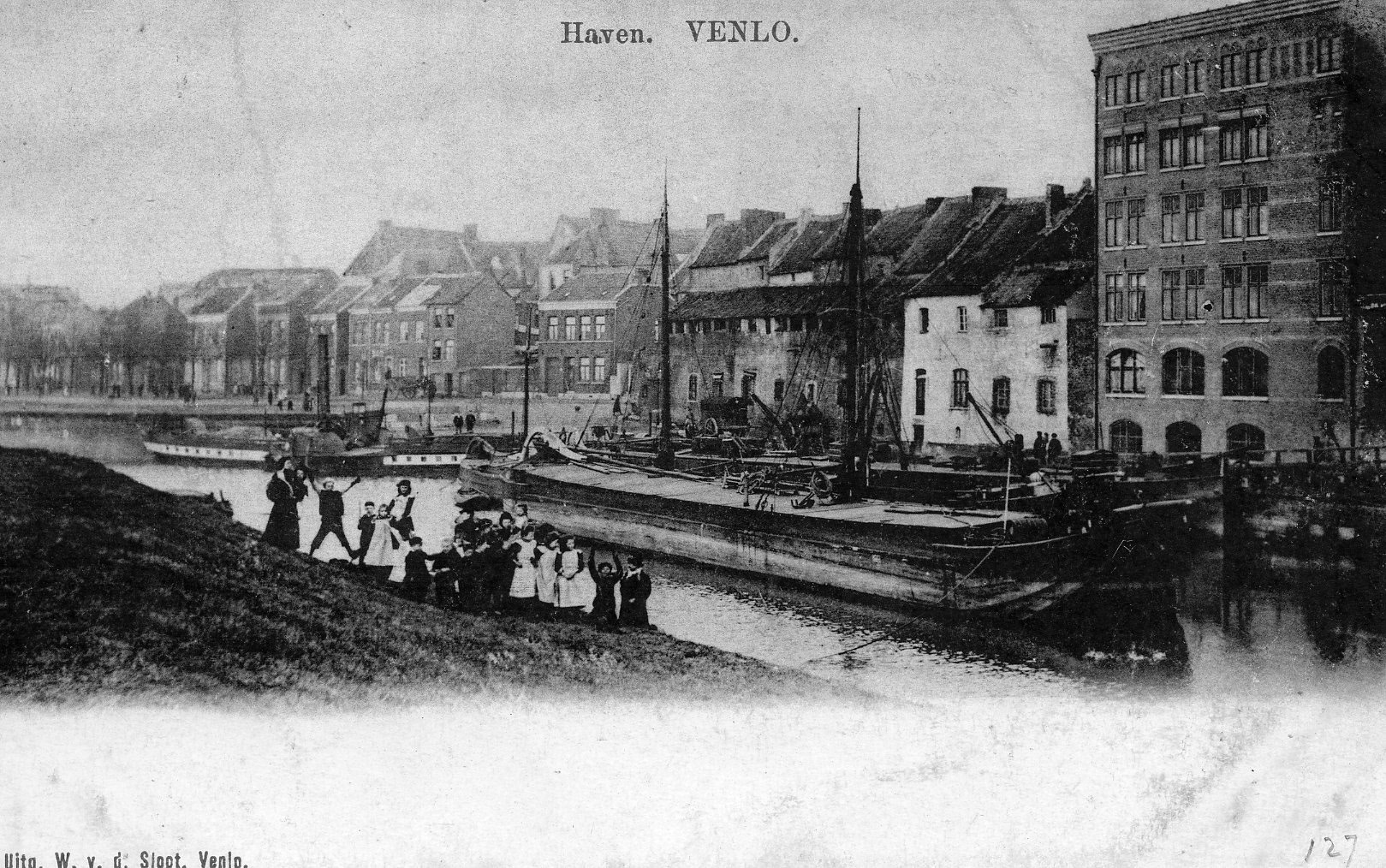 Havenkade met gebouw van fa. Bontamps rond 1900